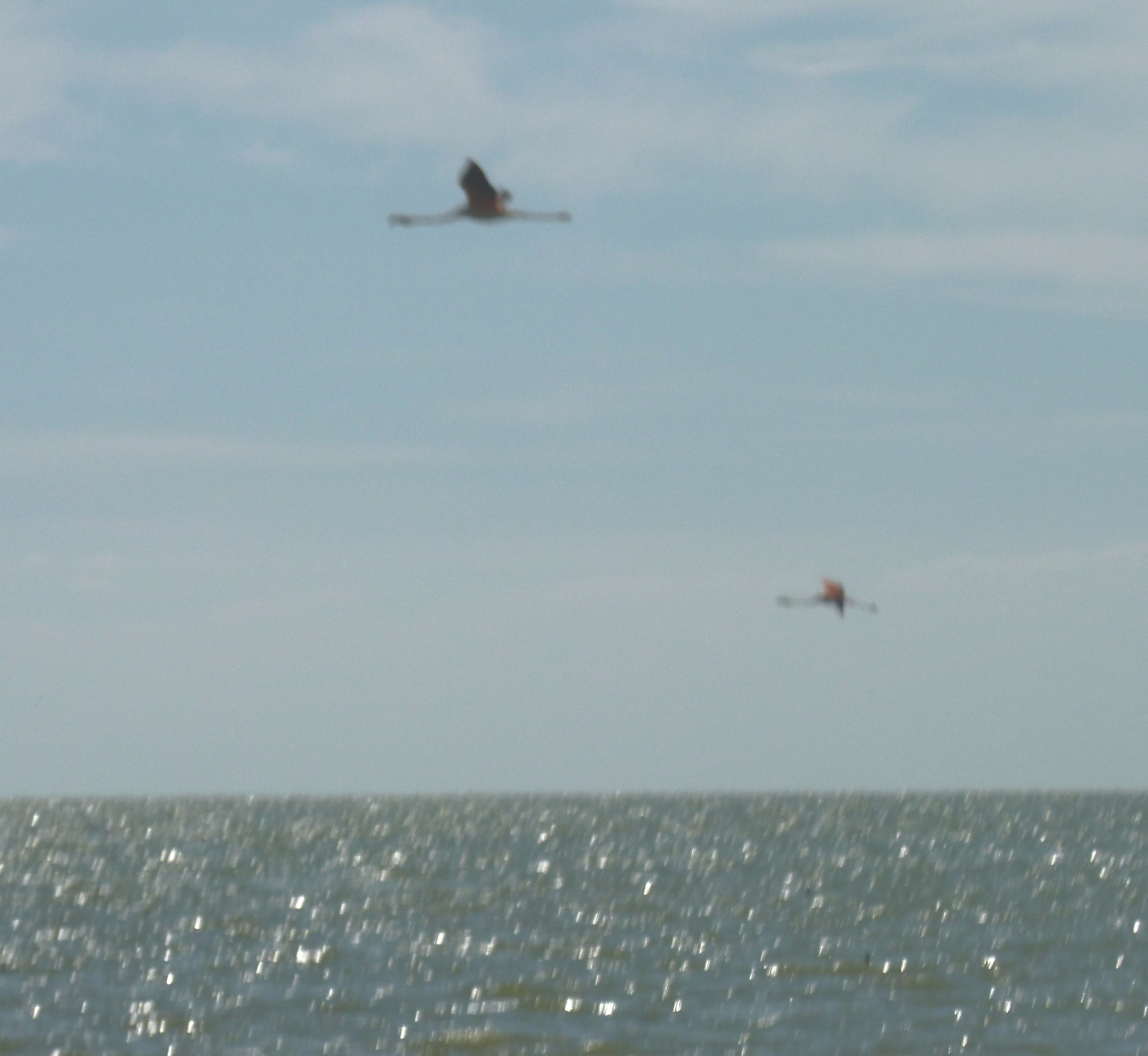 2 Flamencos volando en los Bañados del Rio Dulce y Laguna Mar Chiquita(Reserva Provincial de Cordoba-Argentina_Declarada sitio Ramsar